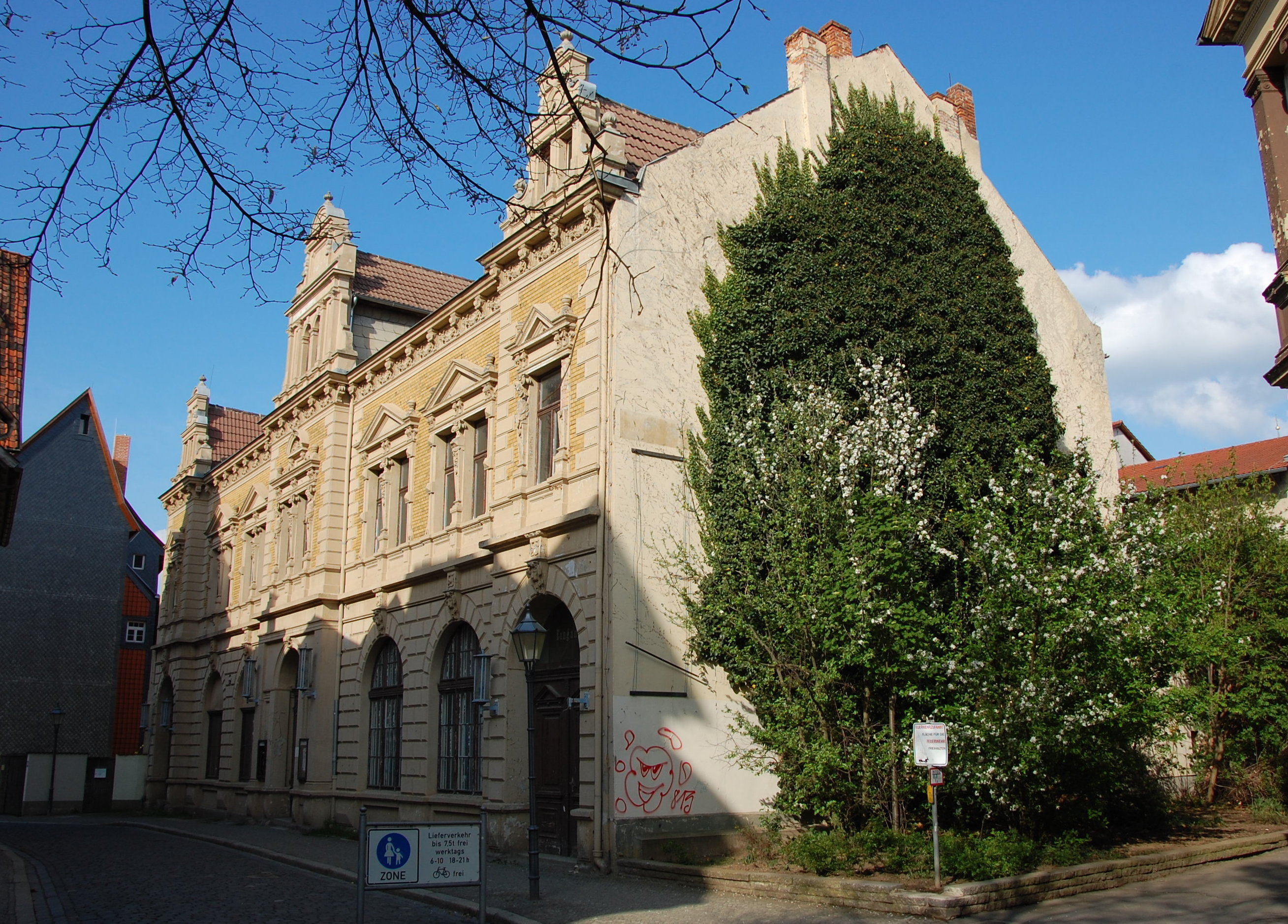 Haus Pölle 34 in Quedlinburg